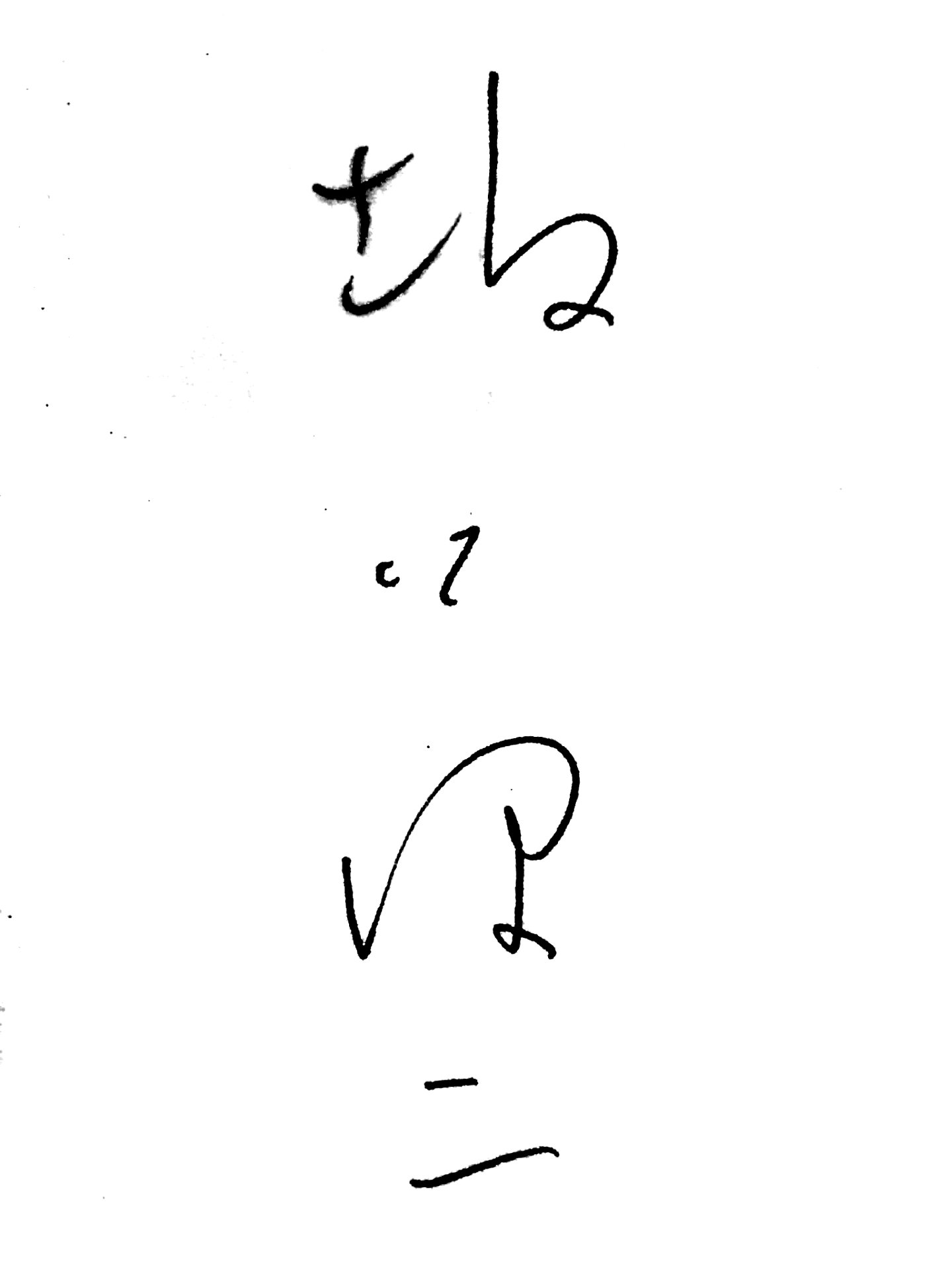 坂口健二博士のサイン